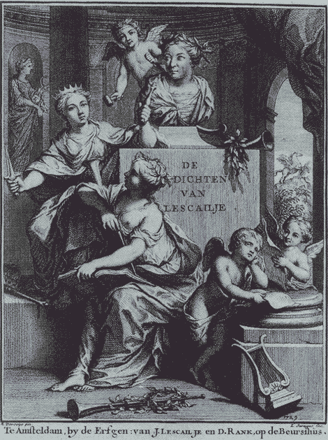 Titelpagina Katharyne Lescailje (1731) (also: Katharina Lescailje, Catharina Lescaille)